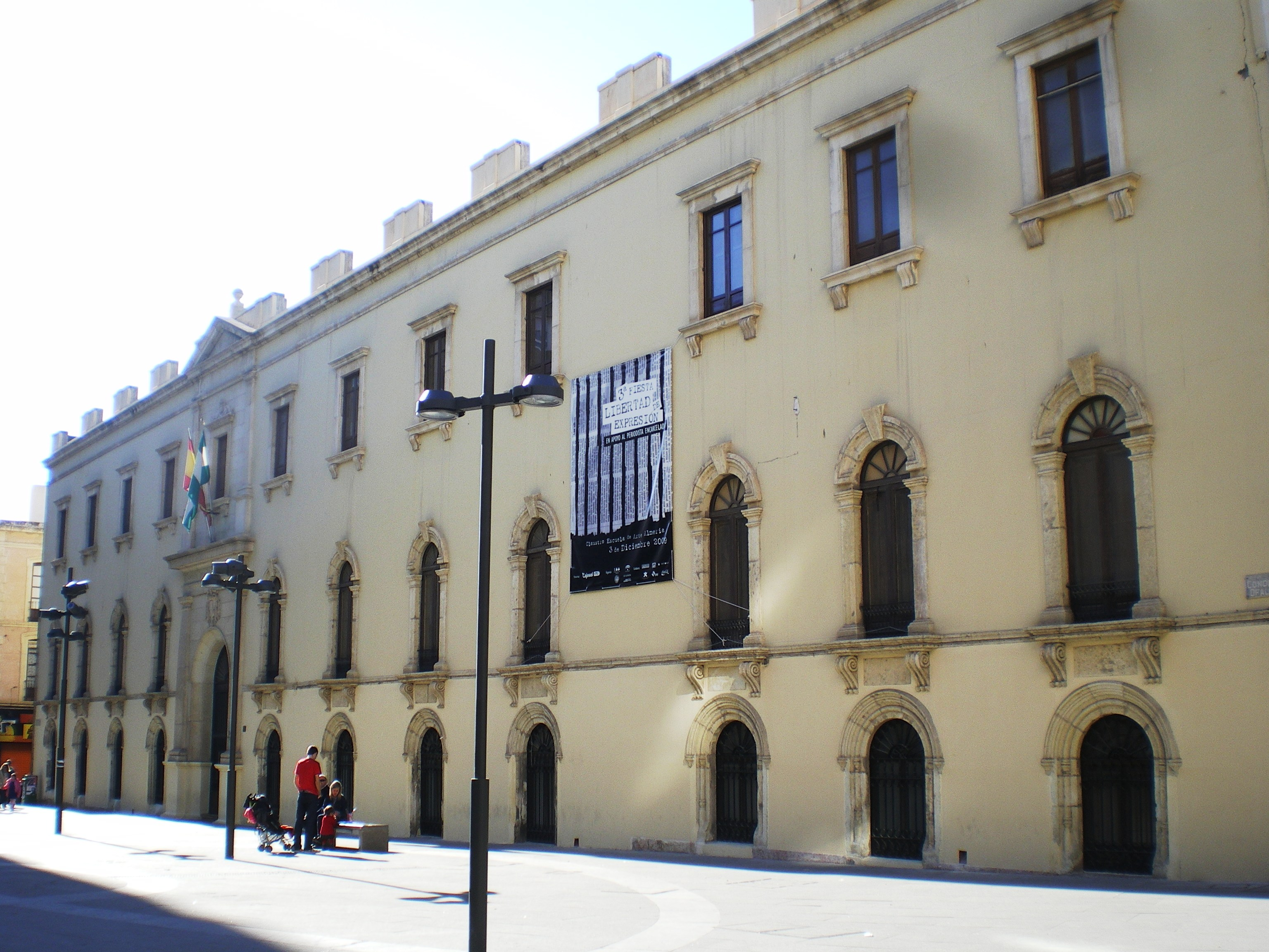 Fotografía de la fachada este del la Escuela de Artes y Oficios de Almería, Andalucía, España.